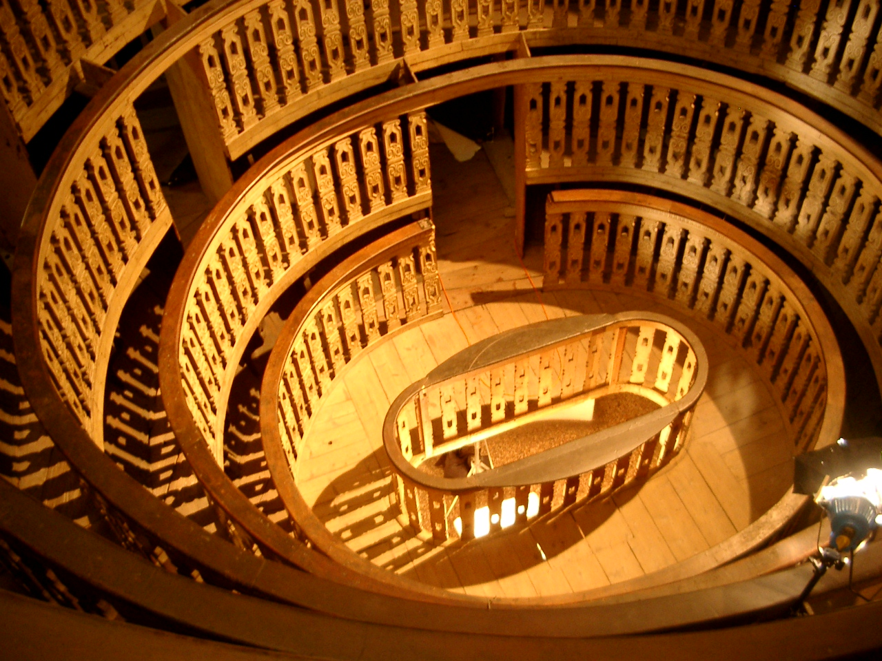 Foto scattata da Marco Bisello